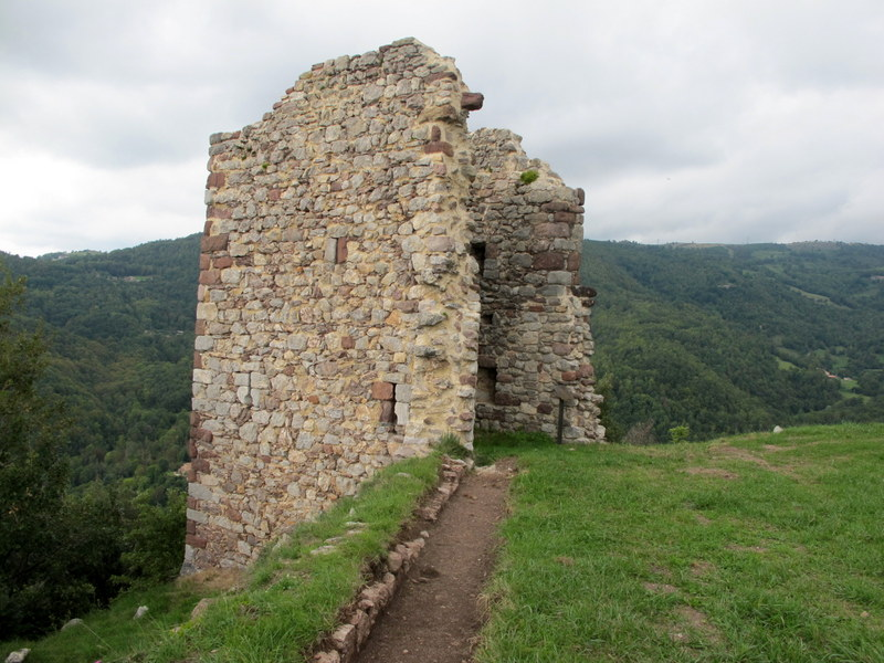 castell de Rocabruna - Camprodon a la comarca del Ripollès - Catalunya